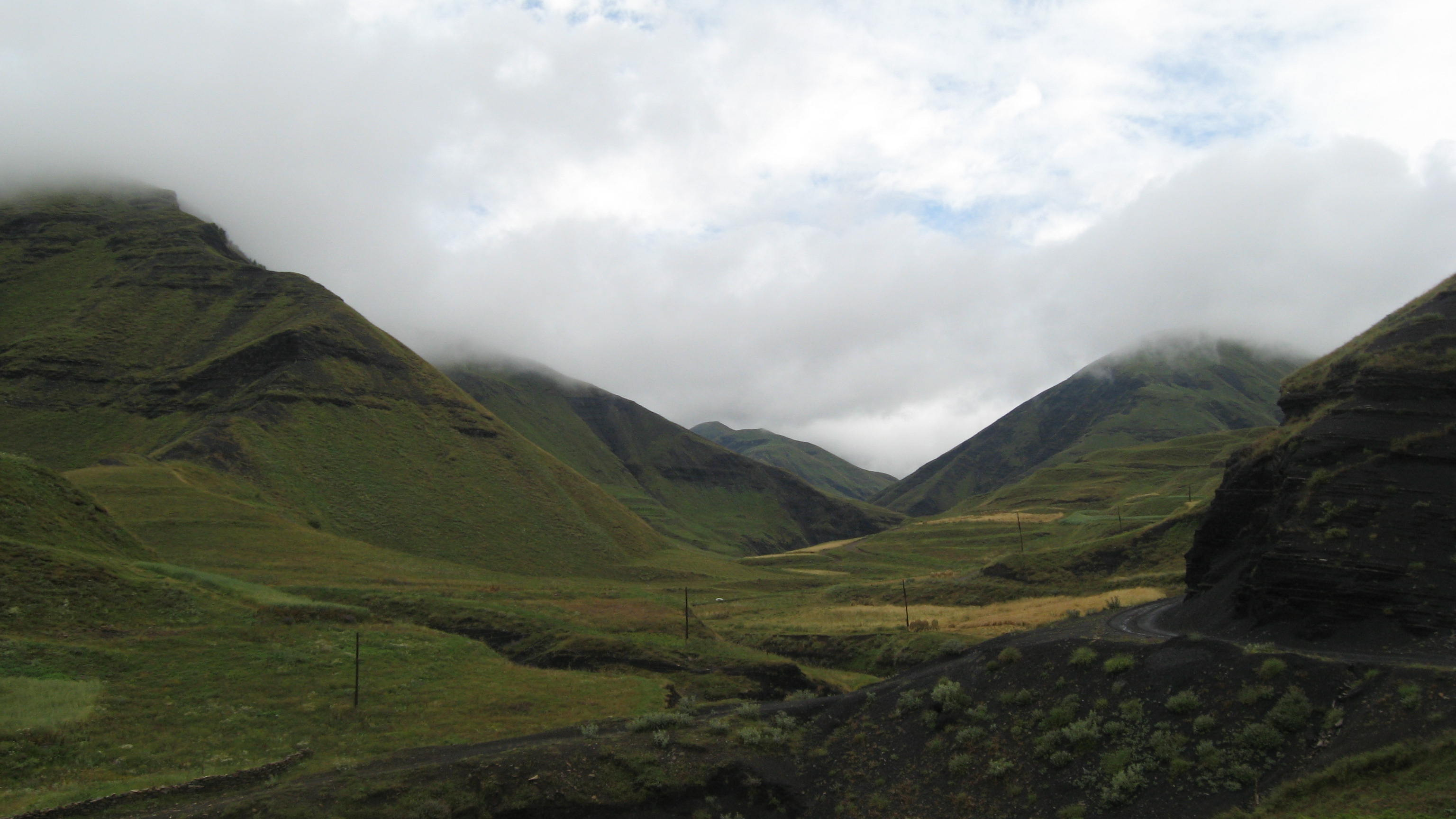 Дагестан. Горы в Агульском районе